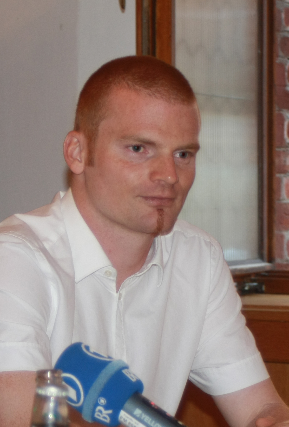 Andreas Biermann, deutscher Fußballspieler, Ex-Fußball-Profi. Hier während einer Pressekonferenz (Eröffnung "3. Münchner Woche für Seelische Gesundheit") am 4. Oktober 2011 im Münchner Rathaus.